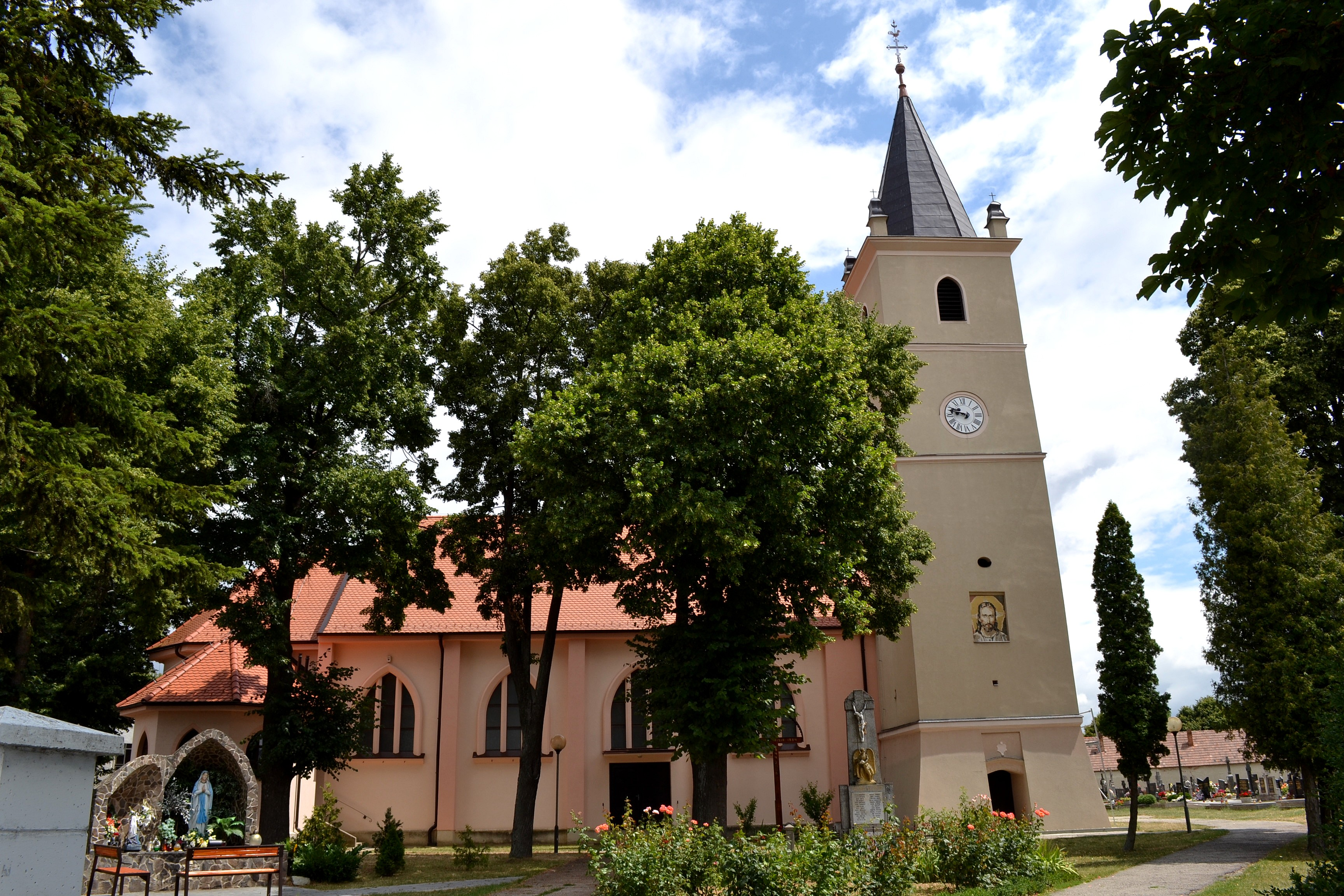 Chorvátsky Grob, Kostol Krista Kráľa; celkový pohľad od západu